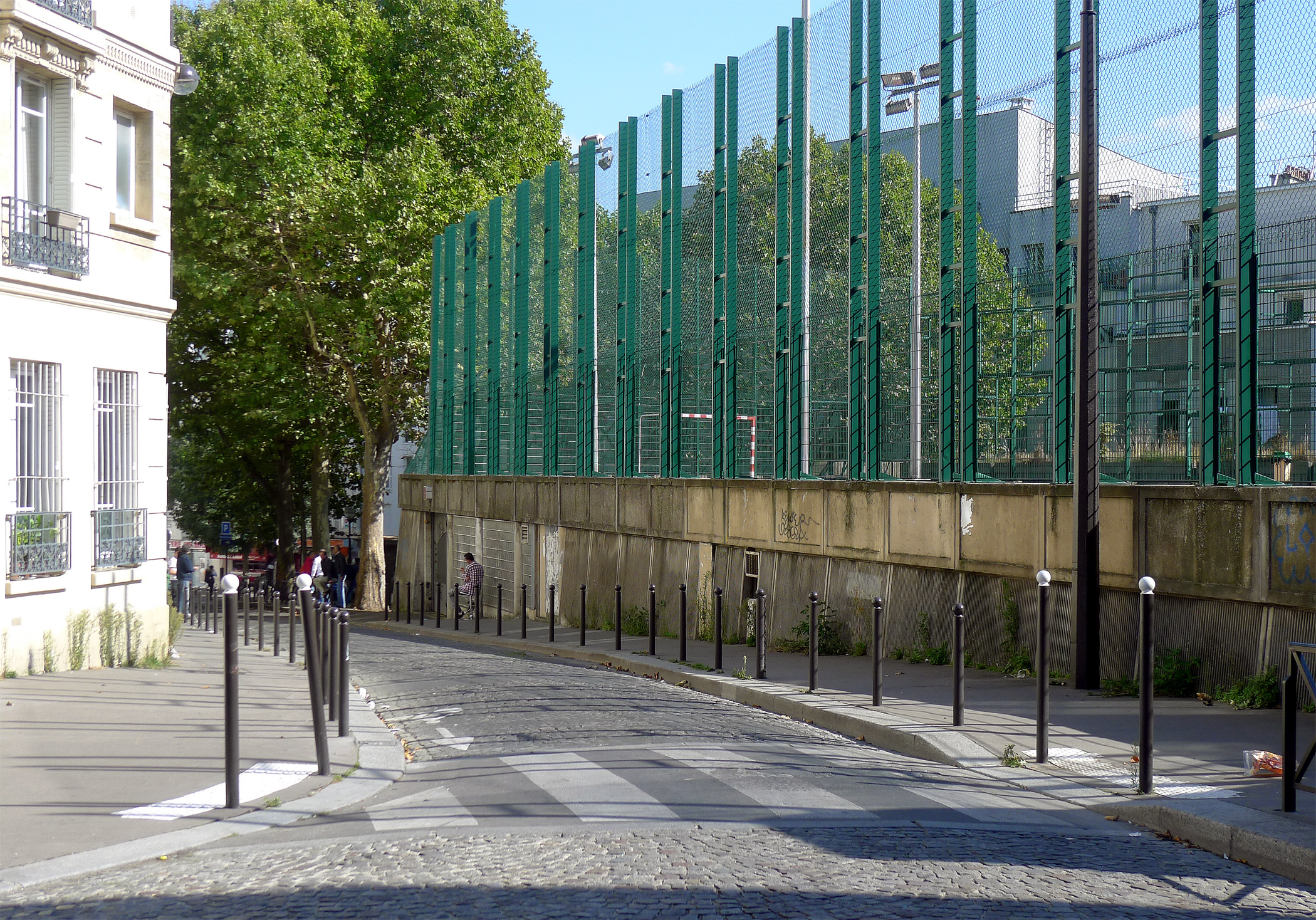 Rue Polonceau - Paris XVIII